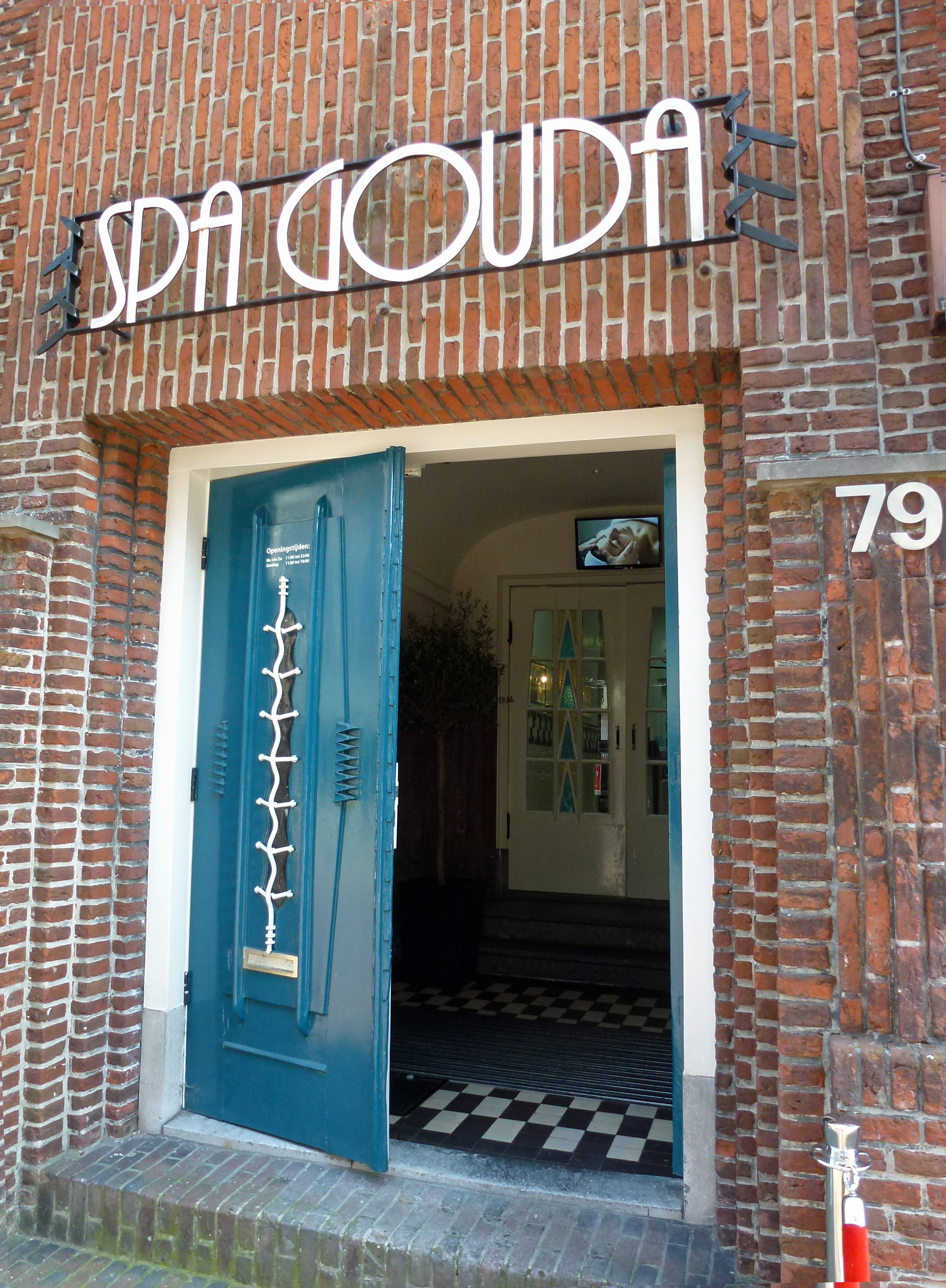 Voormalig badhuis uit 1922